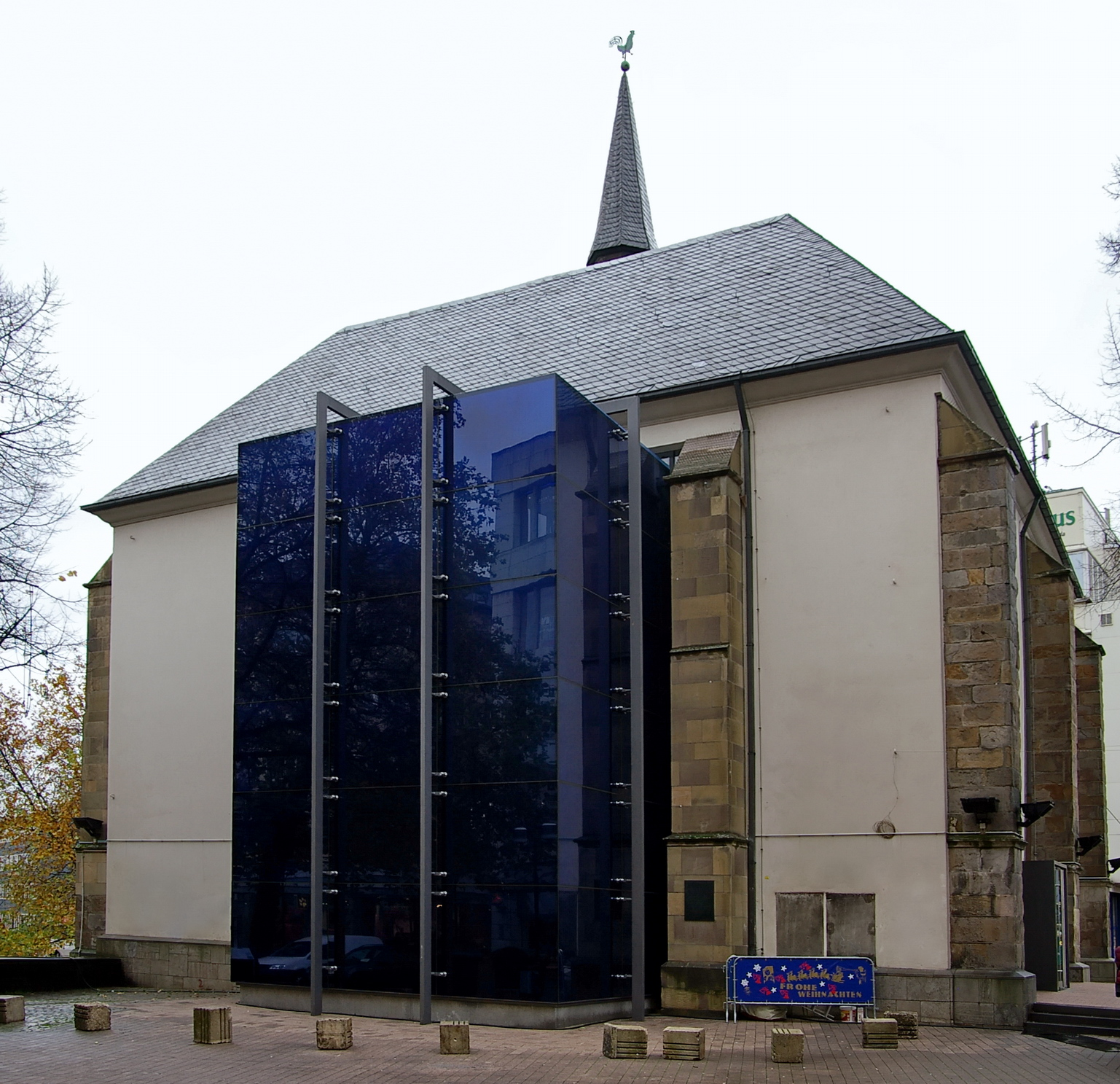 Marktkirche in Essen mit Erweitungsanbau Blauer Glaskubus.